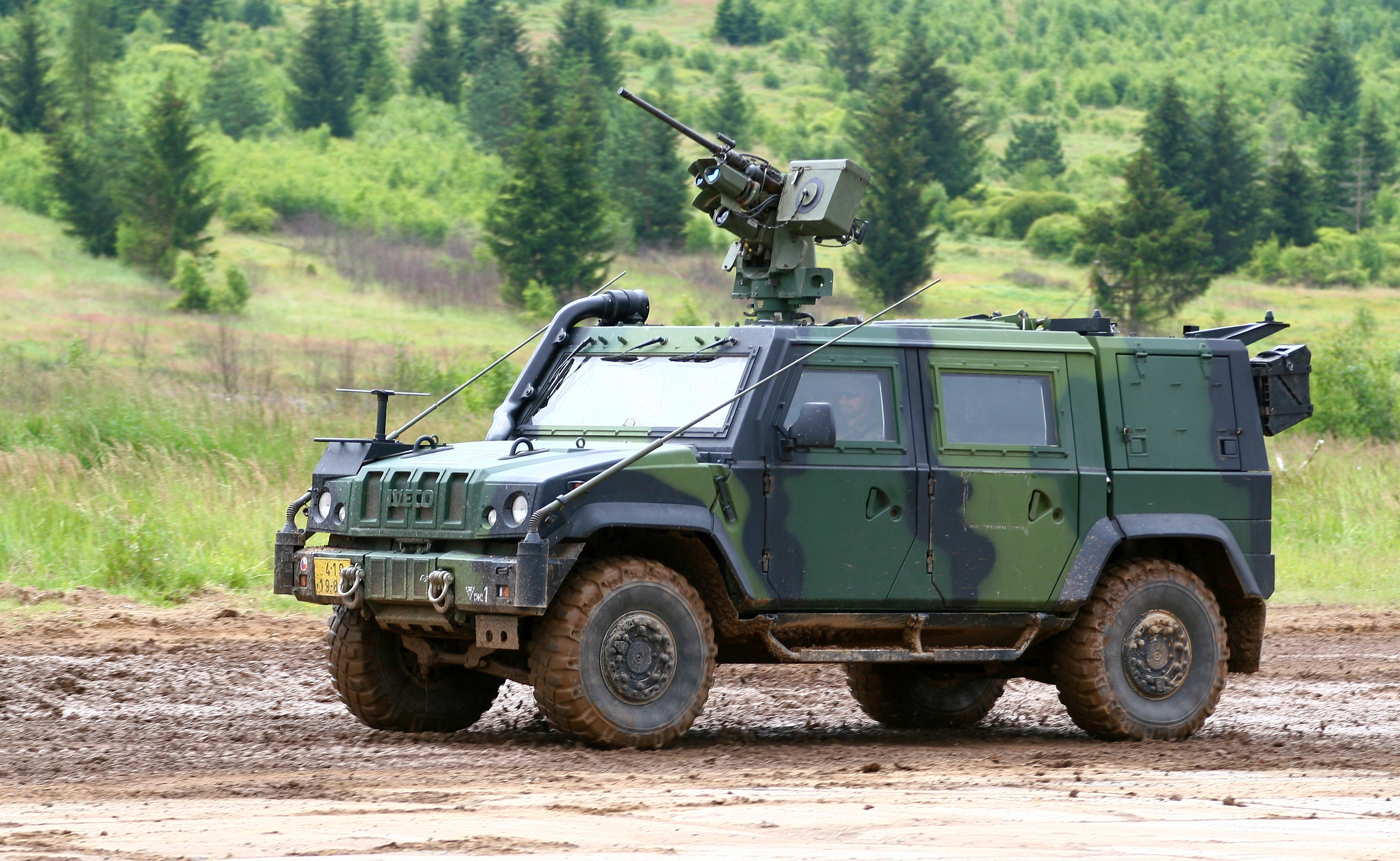 Vojenská technika zaznamenaná při dynamických ukázkách na Dni pozemního vojska BAHNA 2018, který pořádá Velitel společných sil a Nadace pozemního vojska AČR.